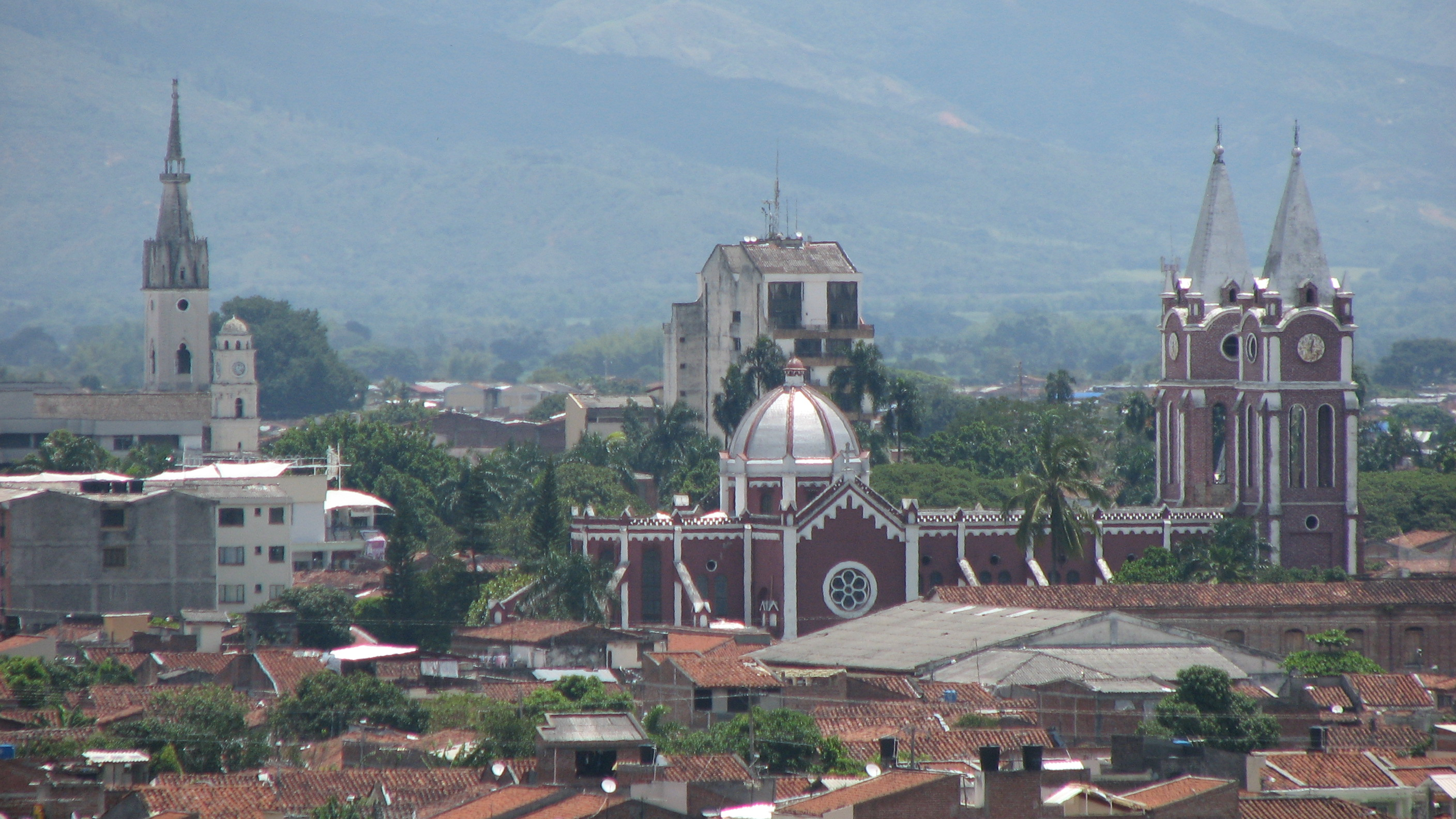 Tuluá, Valle del Cauca, Colombia